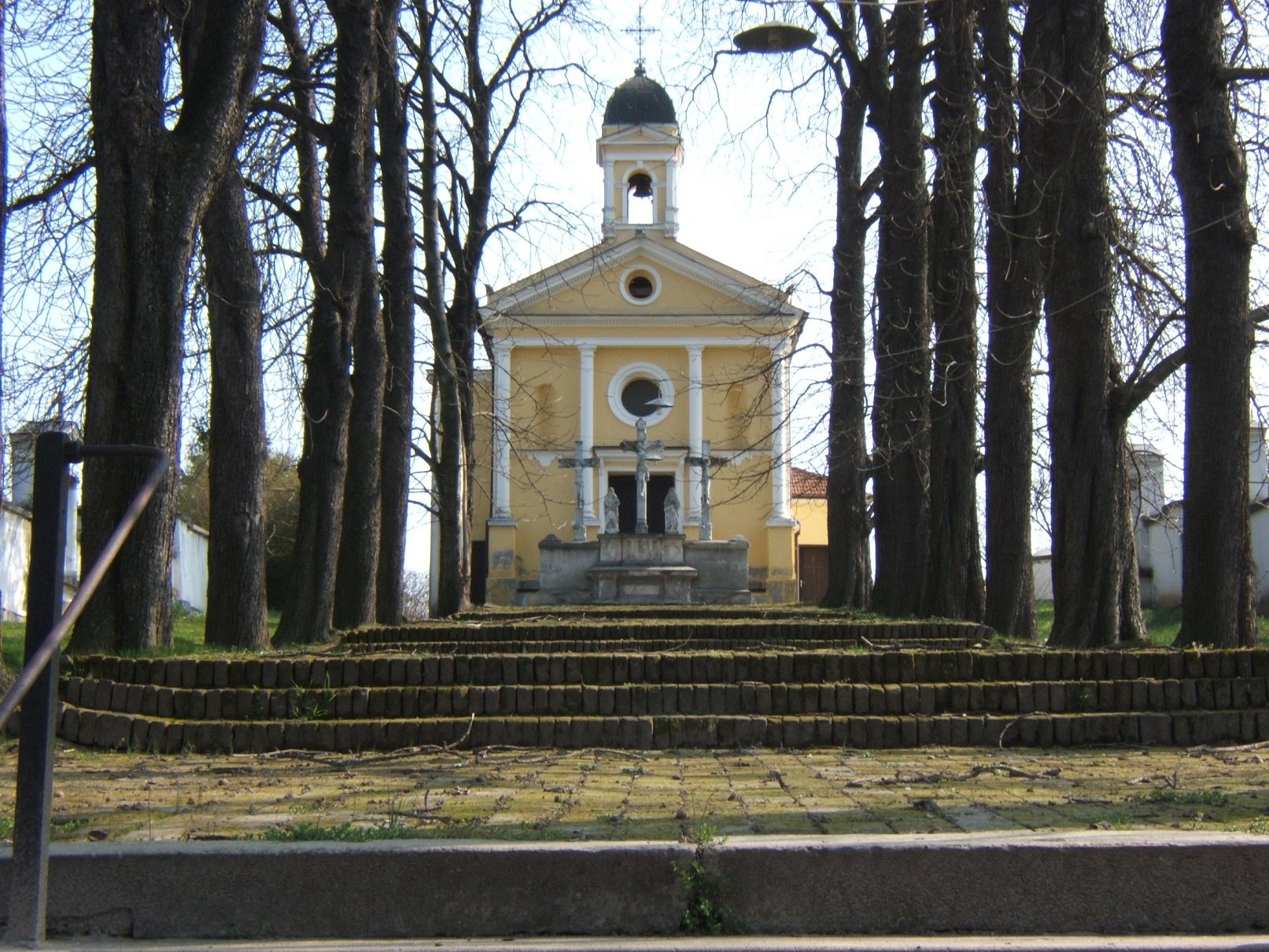 Kaposvár, donneri kálvária-kápolna